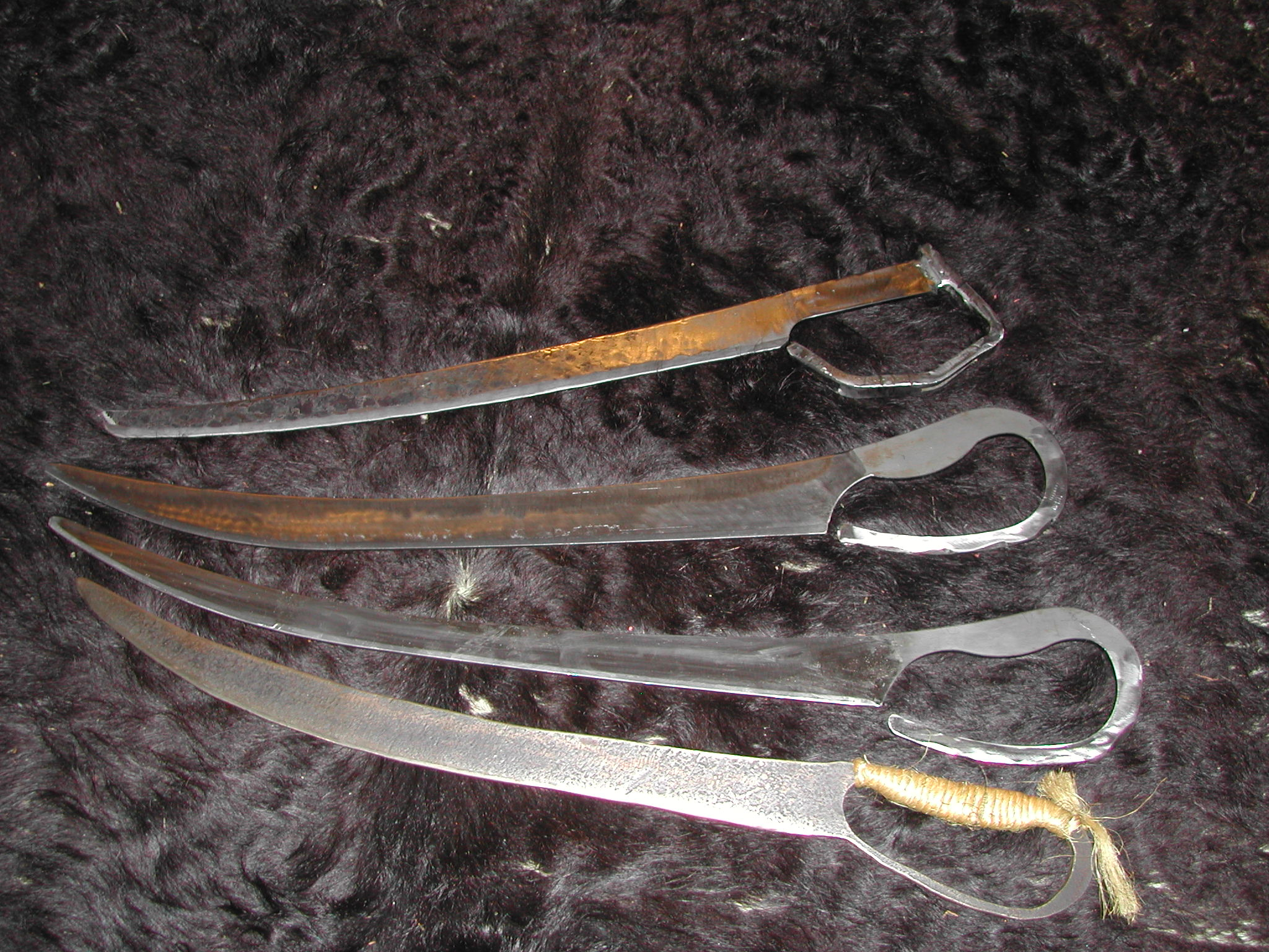 Dussakformen aus c45, c60 und 600er Manganstahl.